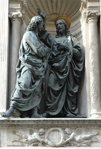 Firenze, Orsanmichele. Tabernacolo dell'arte della Mercatanzia, con San Tommaso